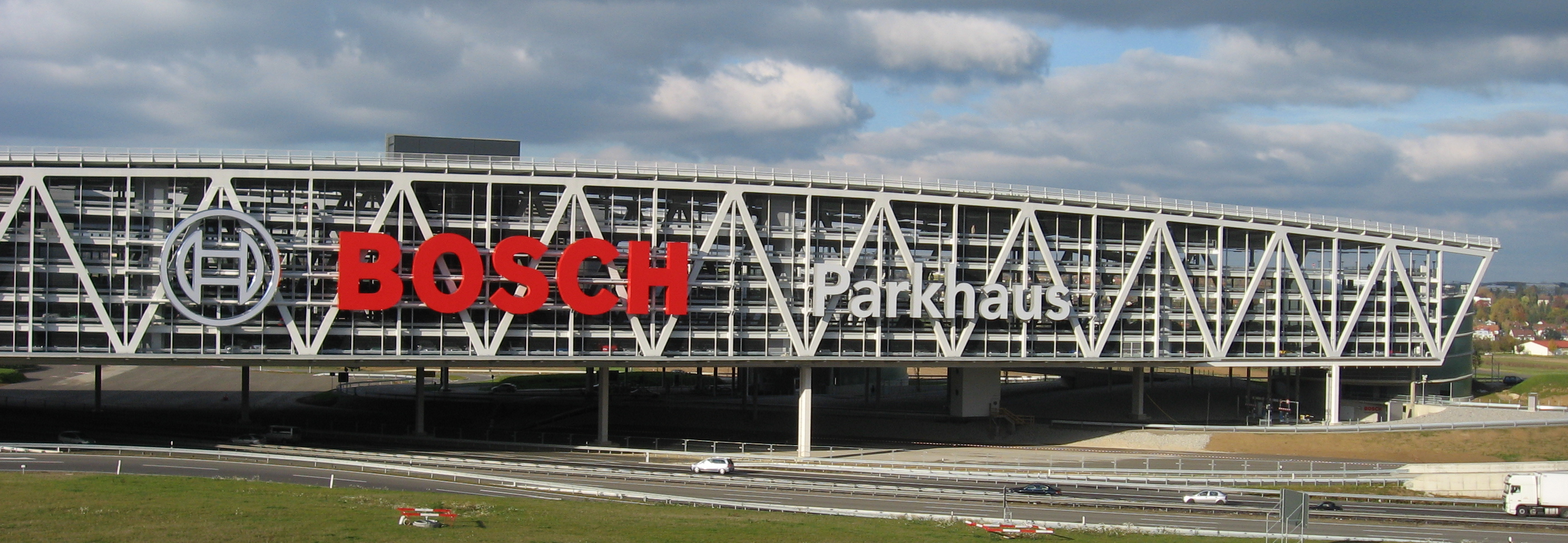 Neue Messe Stuttgart, Bosch-Parkhaus